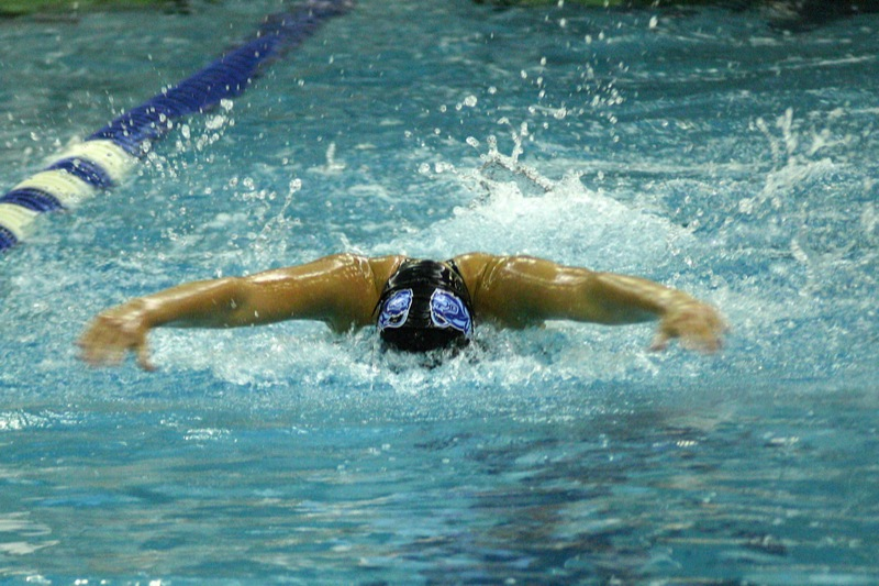 Butterfly swimmer